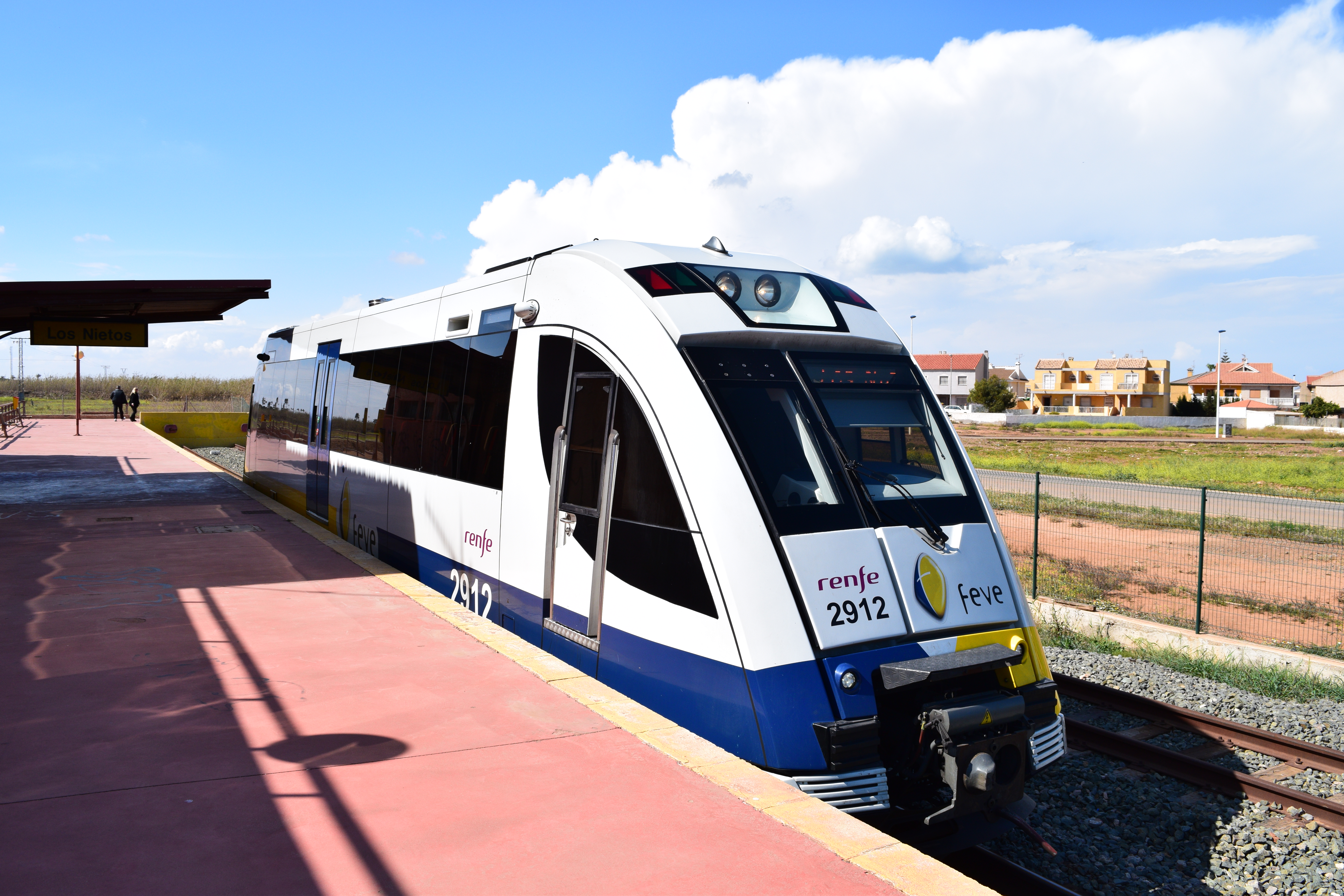 Unidad de la serie 2900 de FEVE en la estación de Los Nietos, en la región de Murcia, en la línea Cartagena-Los Nietos.